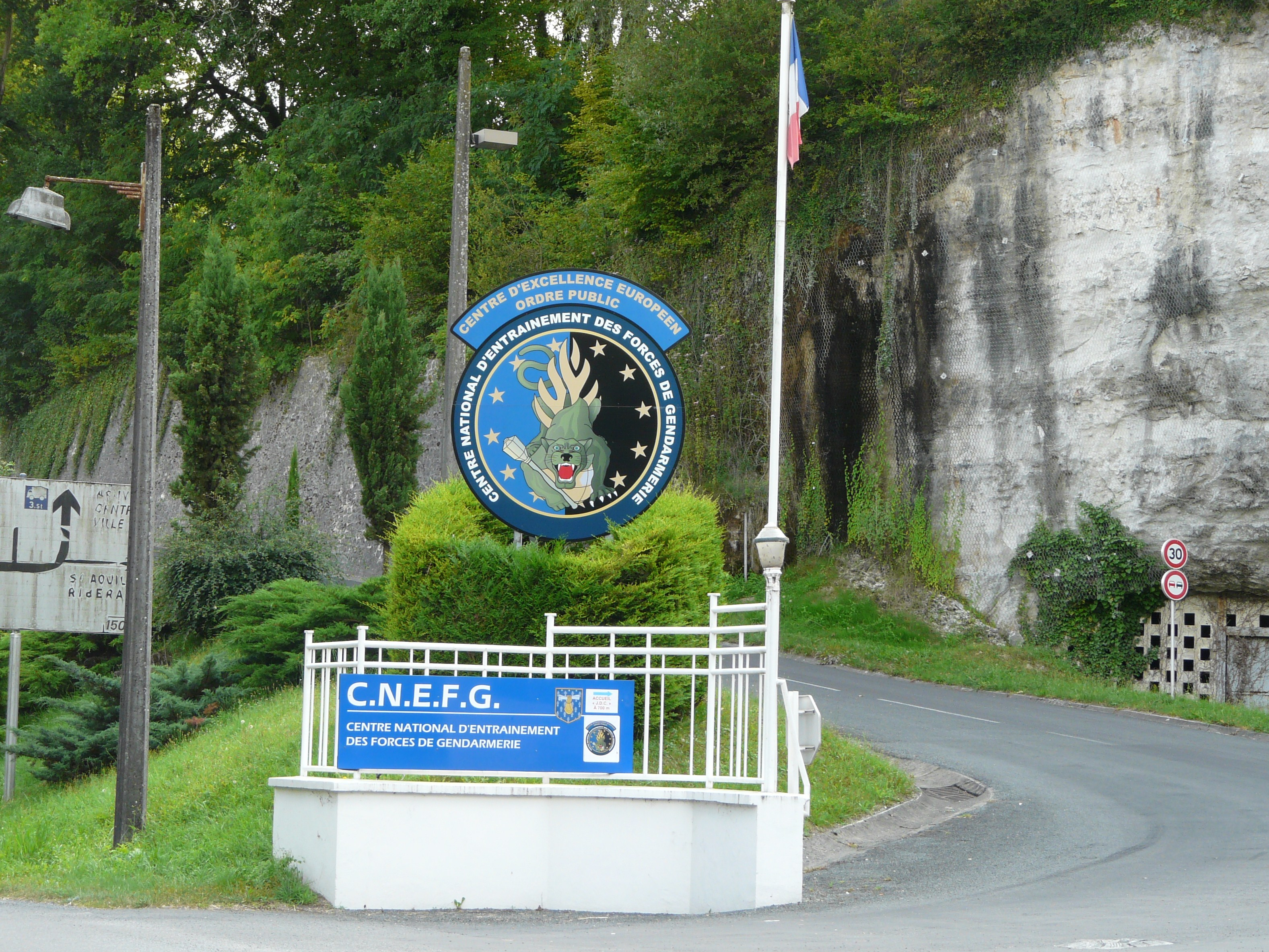 L'entrée du Centra national d'entrainement des forces de gendarmerie (CNEFG) à Saint-Astier, Dordogne, France.